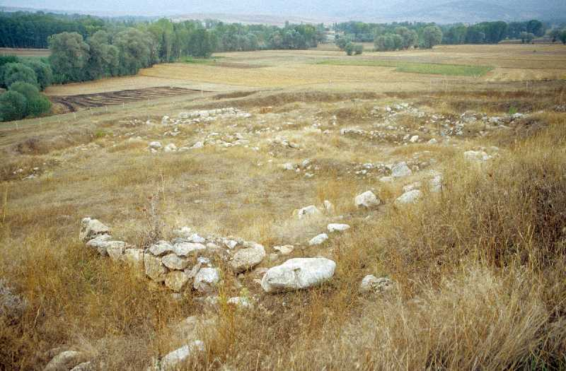 Mauerreste auf dem Maşat Höyük, hethitische Stadt Tapikka mit Palastanlage und Zitadelle, bei Zile, Zentraltürkei